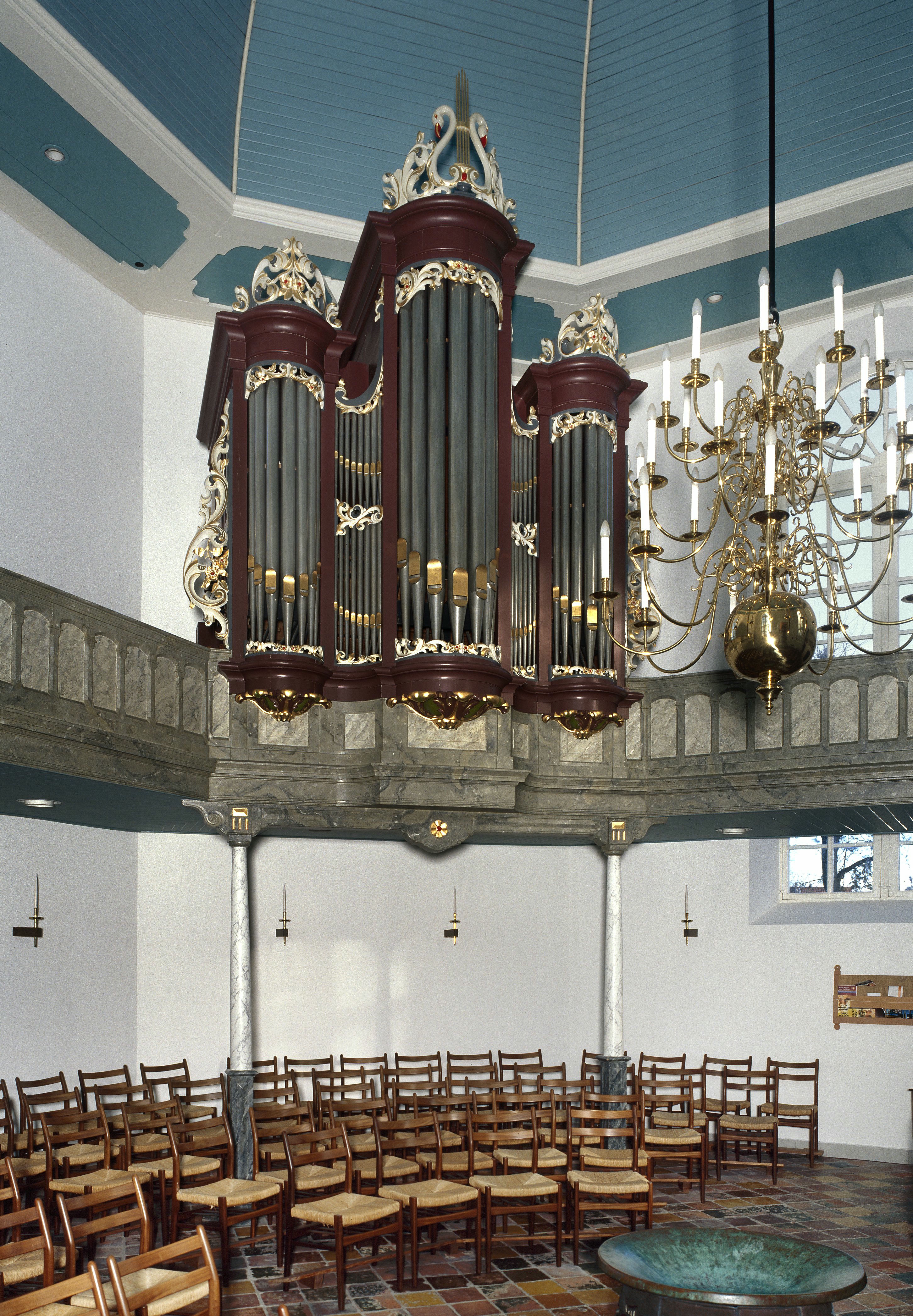 Nederlands Hervormde Kerk: Interieur, aanzicht orgel, orgelnummer 1706 (opmerking: Gefotografeerd voor Het Historische Orgel in Nederland 1886-1894, bladzijde 244)